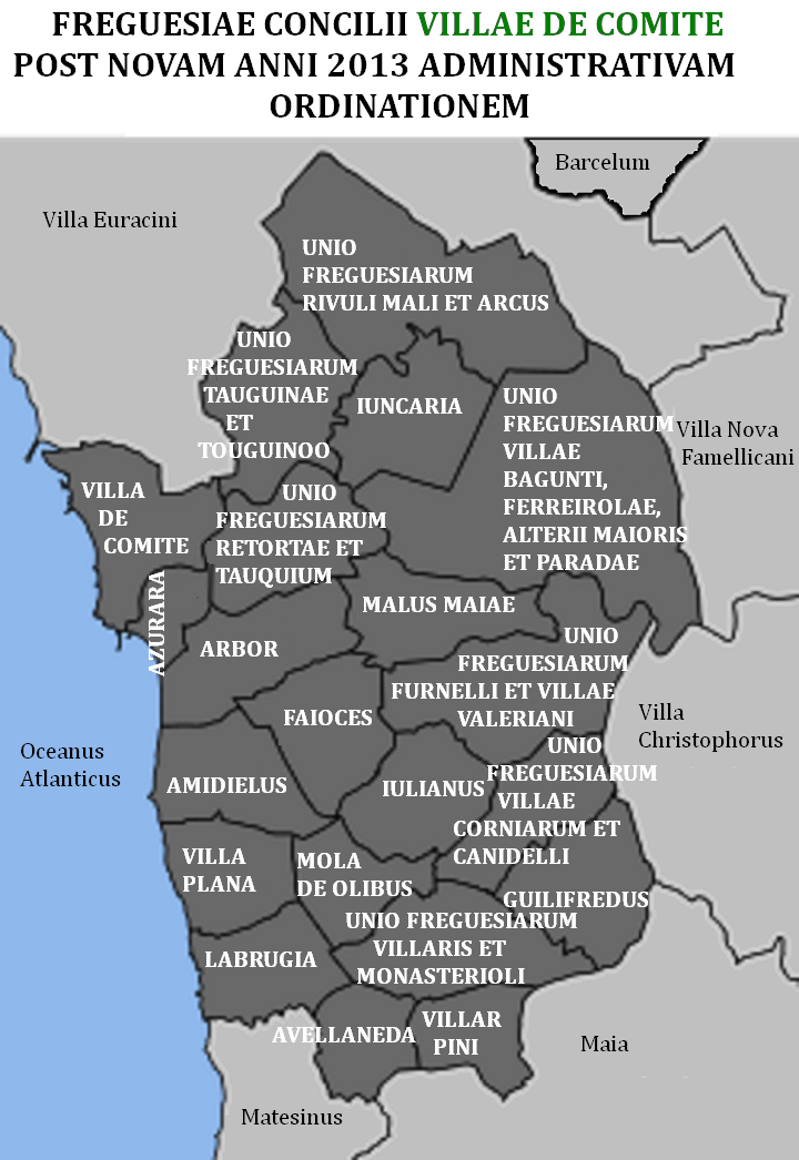 Freguesiae Concilii Villae de Comite post novam anni 2013 administrationem ordinationem